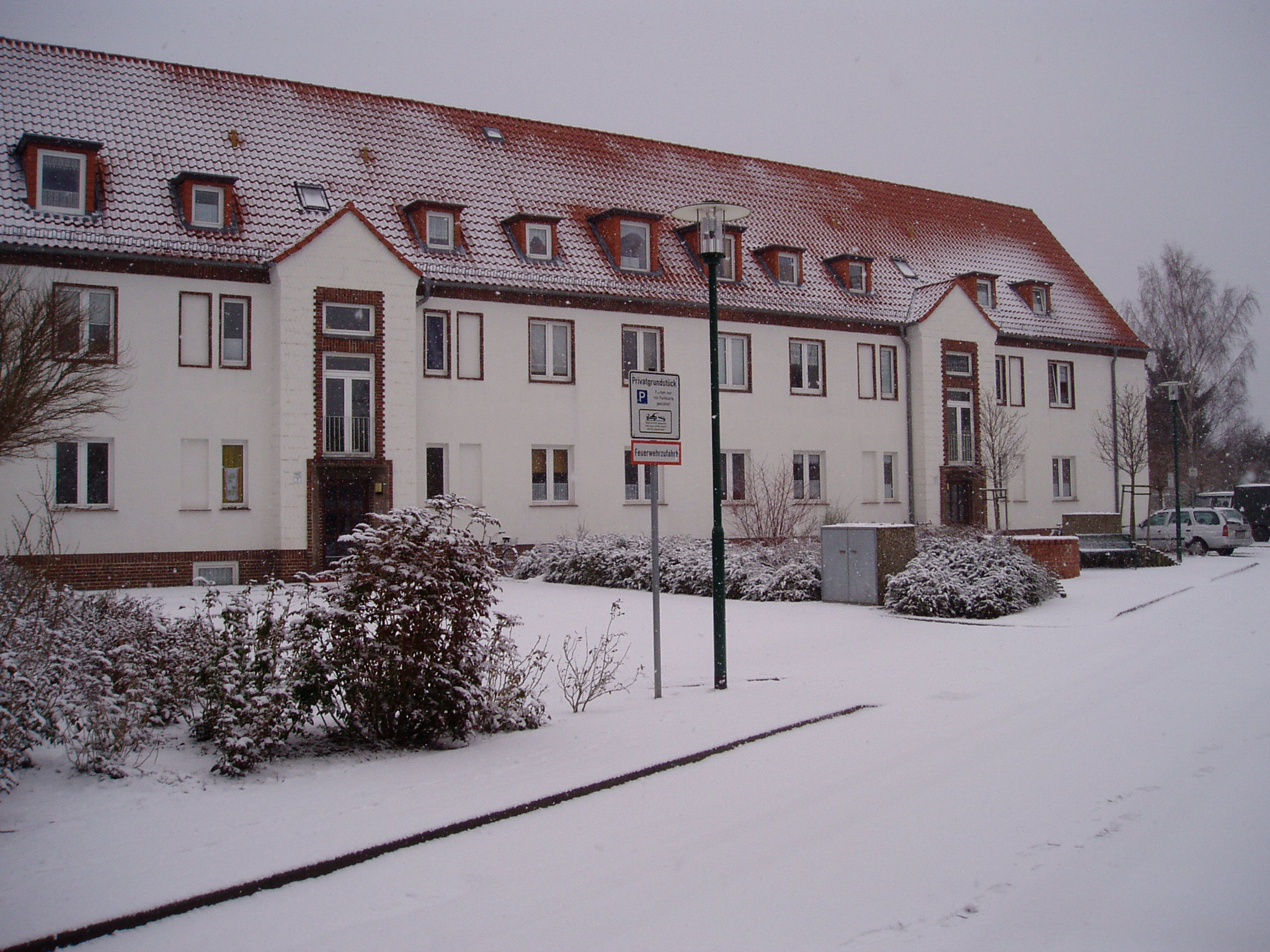 Wohnhaus der ehemaligen Flugplatzsiedlung